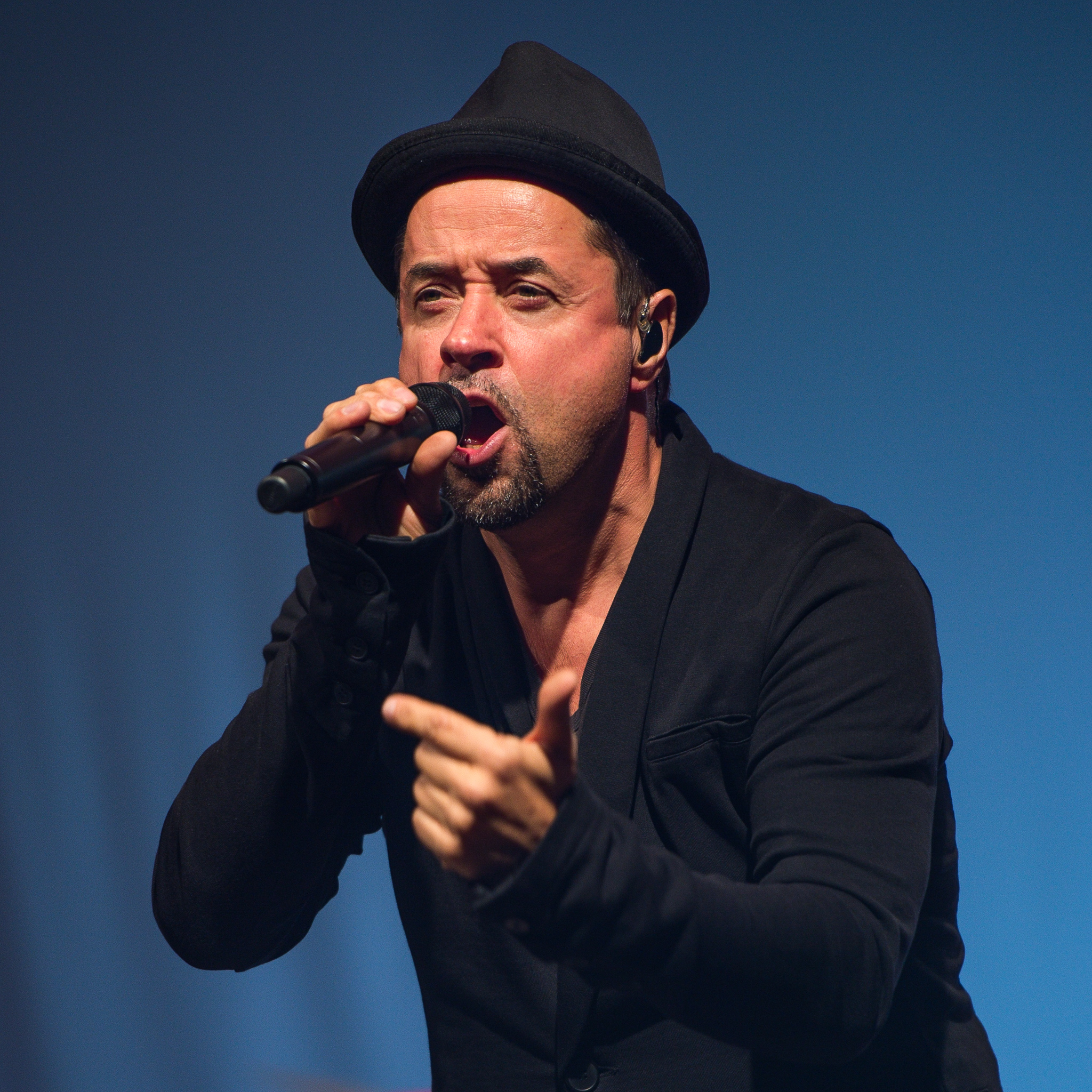 Concertbüro Franken,Konzert,Livekonzert,Livemusik,Musik,Radio Doria mit Jan Josef Liefers,Serenadenhof